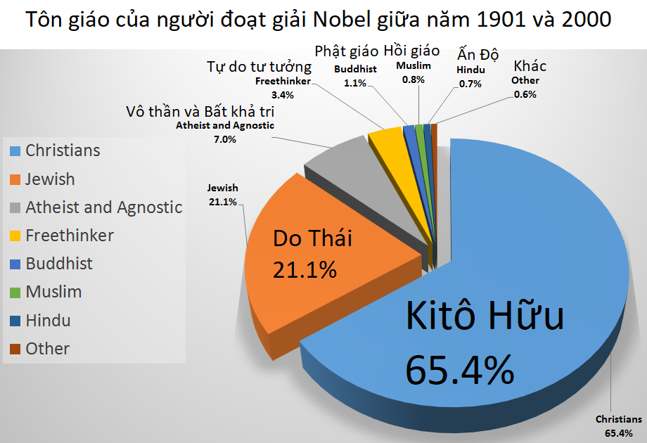 Tôn giáo của người đoạt giải Nobel giữa năm 1901 và 2000 Phân chia những giải Nobel dựa trên tôn giáo giữa năm 1901-2000, tài liệu được lấy của Baruch A. Shalev, 100 Years of Nobel Prizes (2003), Atlantic Publishers & Distributors, trang 59 và trang 57:giữa năm 1901 và năm 2000 cho thấy 654 người đoạt giải Nobel thuộc về 28 tôn giáo khác nhau. Đa số 65,4% người thắng giải Nobel là người Kitô giáo theo các giáo phái khác nhau như sở thích tôn giáo của họ. Tổng quan, các Kitô hữu đã đóng góp tổng cộng 78,3% giải Nobel Hoà bình, 72,5% giải Nobel Hóa học, 65,3% giải Nobel Vật lý, 62% giải Nobel Y học, 54% giải Nobel Kinh tế và 49,5% tất cả các giải Nobel Văn học. Trong khi phân biệt giữa đạo Công giáo với đạo Tin Lành giữa các người Kitô hữu đã trở nên khó phân biệt ra trong một số trường hợp, những dữ liệu sẵn có cho biết có nhiều người tin lành tham gia vào những lãnh vực khoa học và nhiều giáo dân Công giáo tham gia vào lãnh vực Văn học và Hòa bình. Các dân vô thần, dân bất khả tri, và những người tự do tư tưởng bao gồm 10.5% tổng số người đạt giải Nobel; Nhưng trong khoảng Văn học, những sở thích này tăng cao lên khoảng 35%. Một thông tin nổi bật liên quan đến tôn giáo là số lượng cao những người chiến thắng giải Nobel thuộc về đức tin Do Thái giáo - hơn 20% tổng số giải thưởng Nobel (138); Bao gồm: 17% giải Nobel hóa học, 26% giải Nobel Y học và giải Nobel Vật lý, 40% giải Nobel kinh tế và 11% giải Nobel Hòa bình và giải Nobel Văn học. Các con số thống kê đặc biệt này thật là ngạc nhiên vì thực tế chỉ có khoảng 14 triệu người (0.02% tổng dân số thế giới) là người Do Thái. Ngược lại, chỉ có năm người thắng giải Nobel là người Hồi Giáo _ 0,8% tổng số giải Nobel được trao cho dân số khoảng 1,2 tỷ người (20% tổng dân số nhân loại).